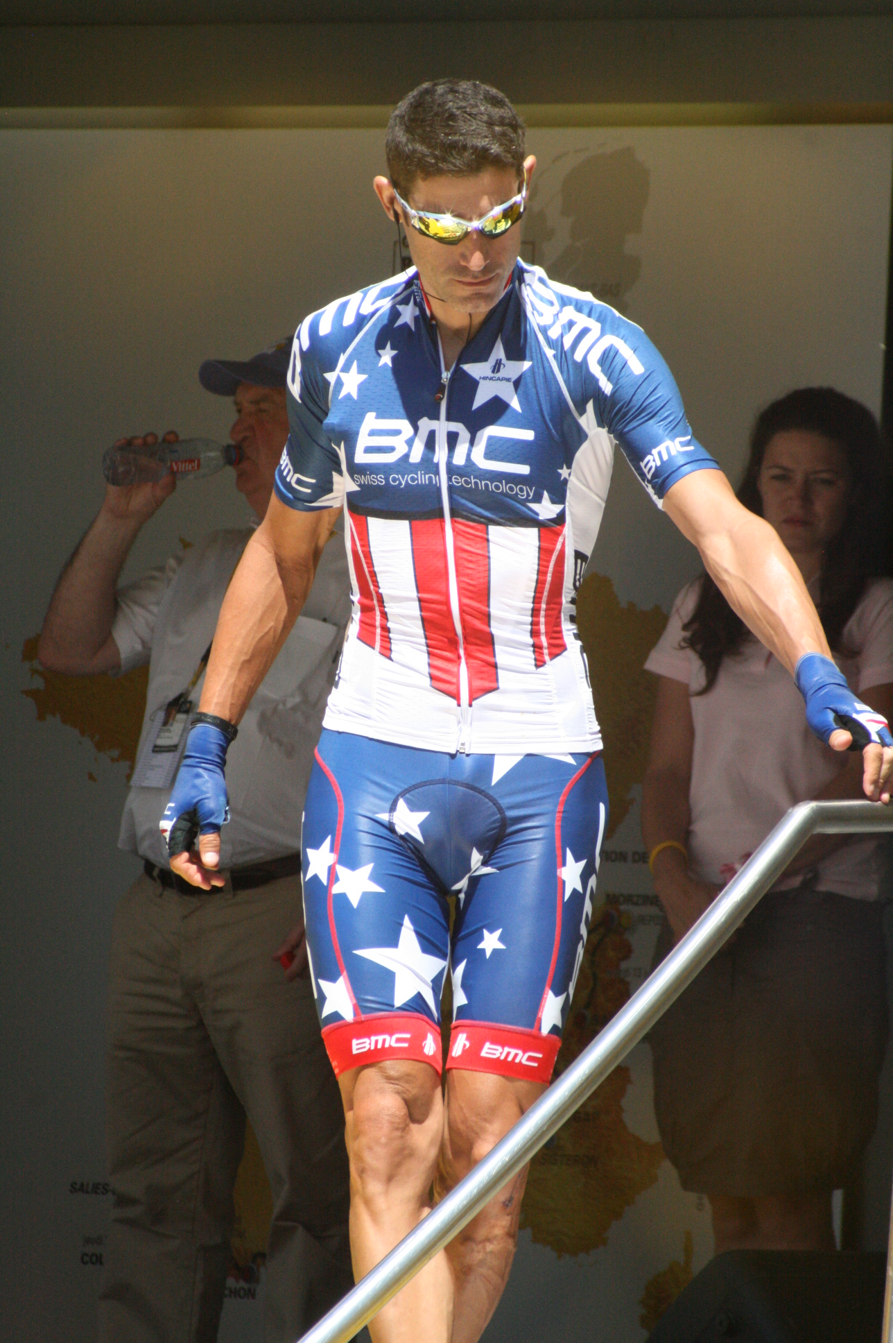 Départ de la 4e étape du Tour de France 2010 - George Hincapie